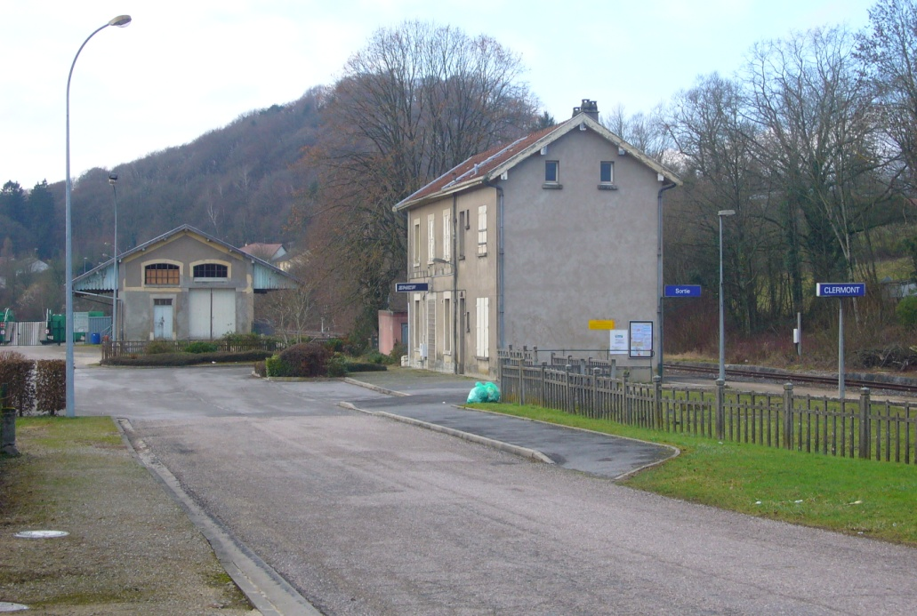 Photographie de la gare SNCF de Clermont en Argonne